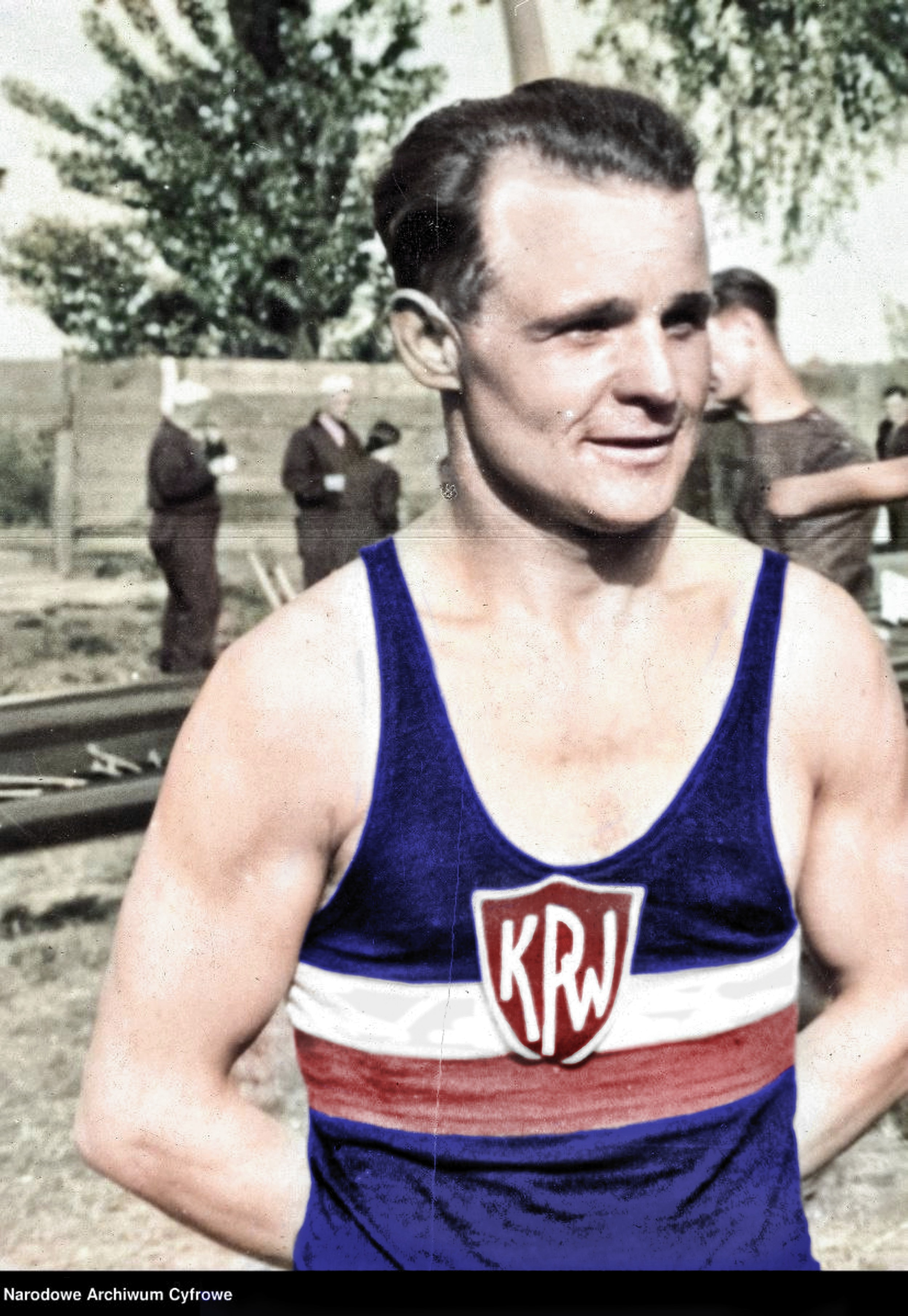 Wacław Wejszewski kajakarz KPW Pomorzanin Toruń; dwukrotny złoty medalista Mistrzostw Polski w kajakarstwie 1938